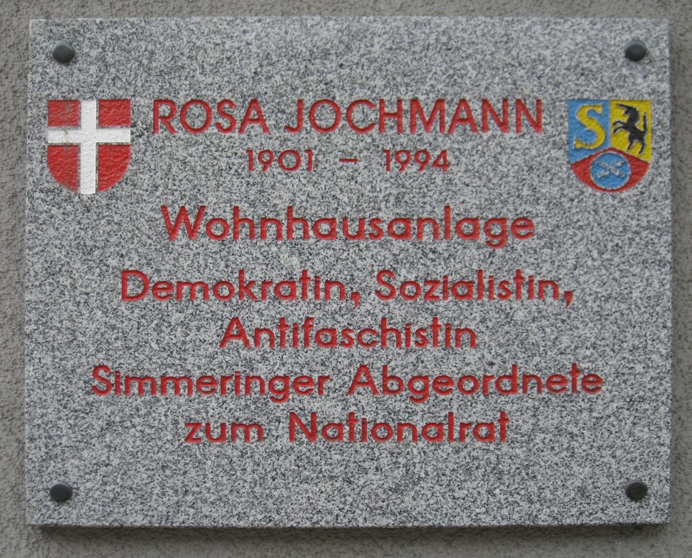 Gedenktafel für Rosa Jochmann am Rosa-Jochmann-Hof in Wien, Simmering This media shows the Vienna residential building (Gemeindebau) with the ID 823.